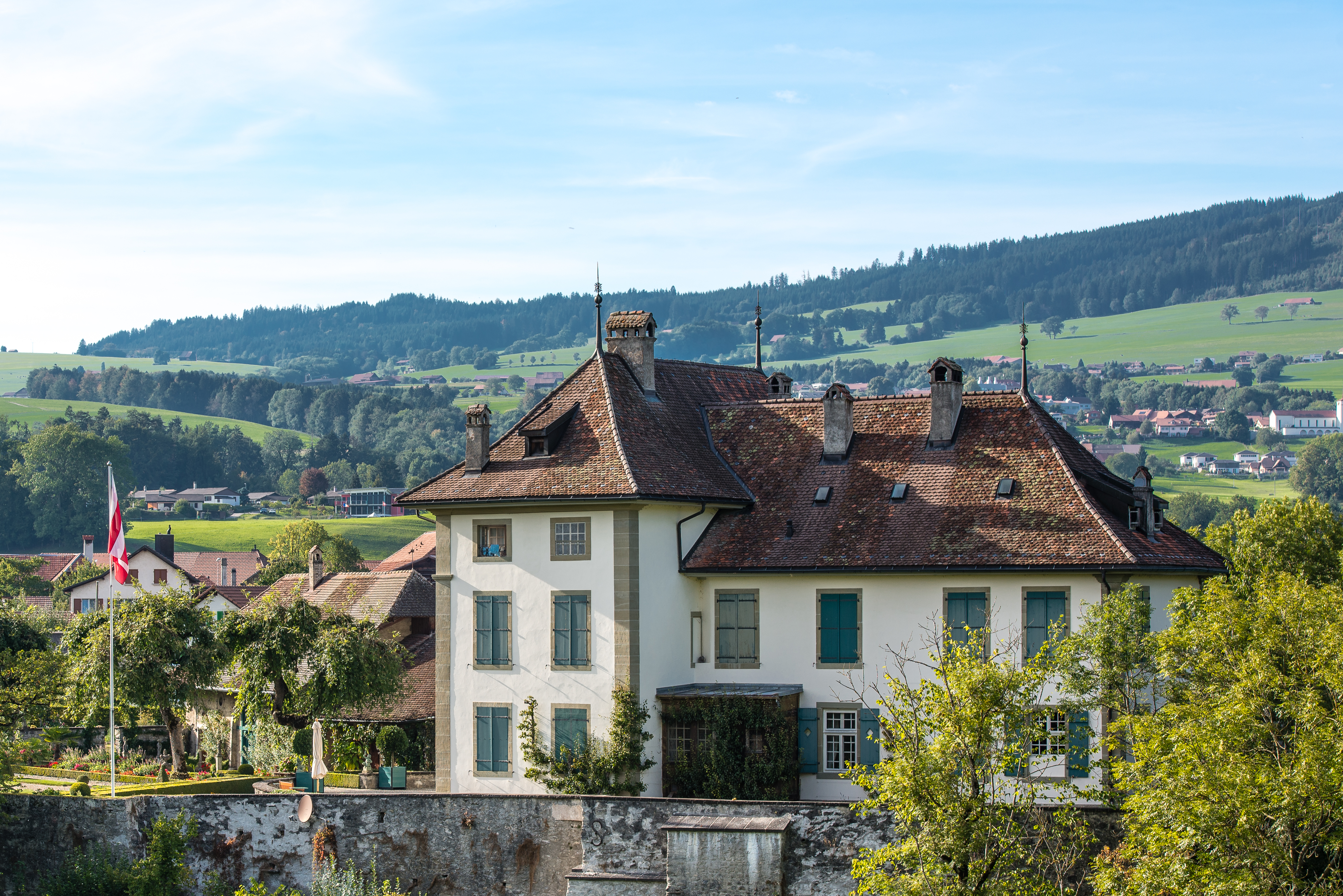 Chateau de Boccard - Vuippens